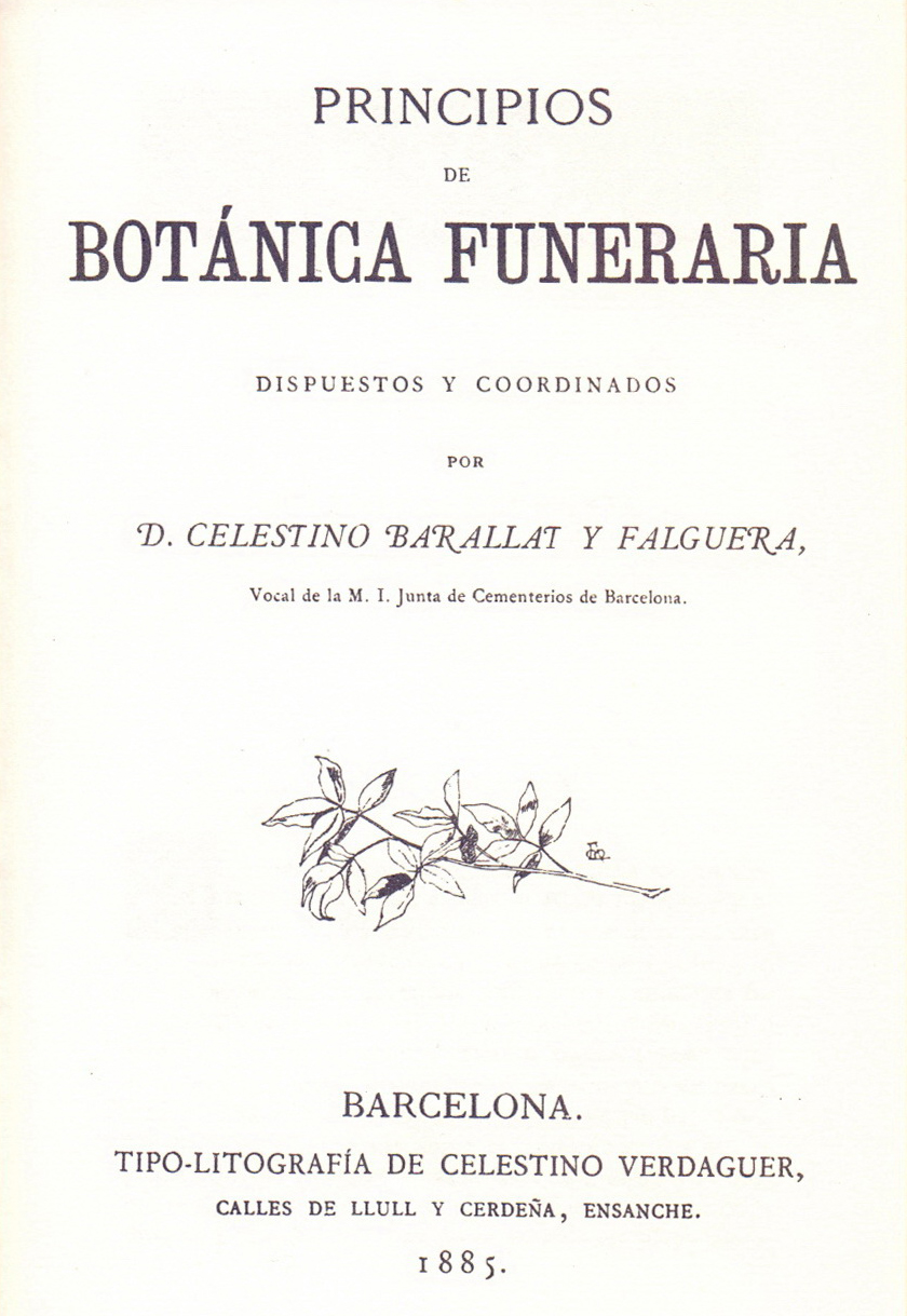 Portada de Principios de botánica funeraria.